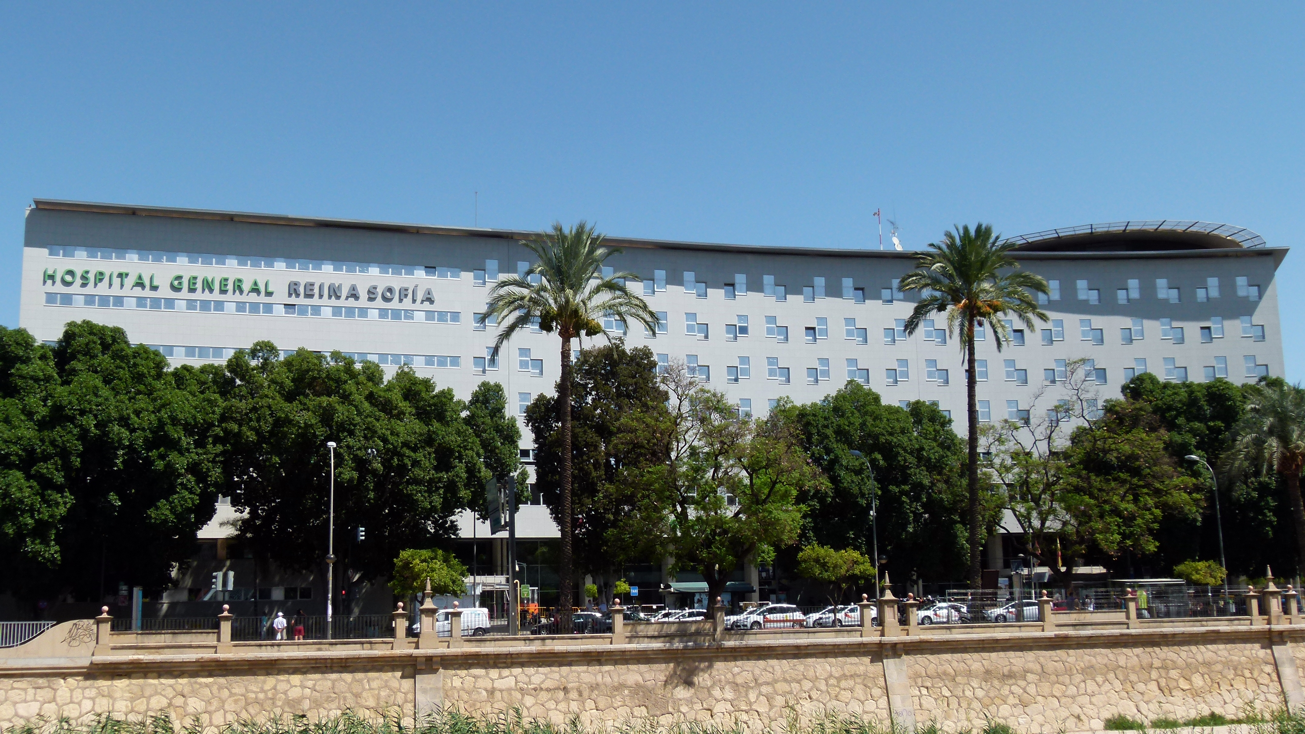 Hospital General Reina Sofia, Murcia, España